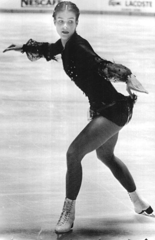 Katarina Witt ADN-ZB AP-Tele-27.11.82 Japan: Katarina Witt siegte in Tokio- Vizeweltmeisterin Katarina Witt (DDR) war bei internationalen Eiskunstlaufwettbewerben in Tokio erfolgreich. Die Karl-Marx-Städterin, die bereits nach der Kurzkür die Führung inne hatte, verwies mit 1,4 Zählern USA-Meisterin Rosalynn Sumners (2,8) und Tiffany Chin (USA 4,6) sicher auf die nächsten Plätze.